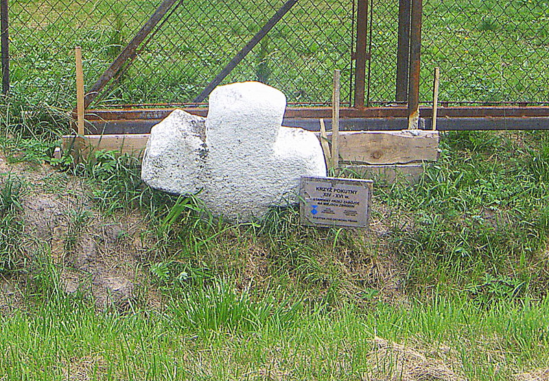 Pasieczna, krzyż pokutny